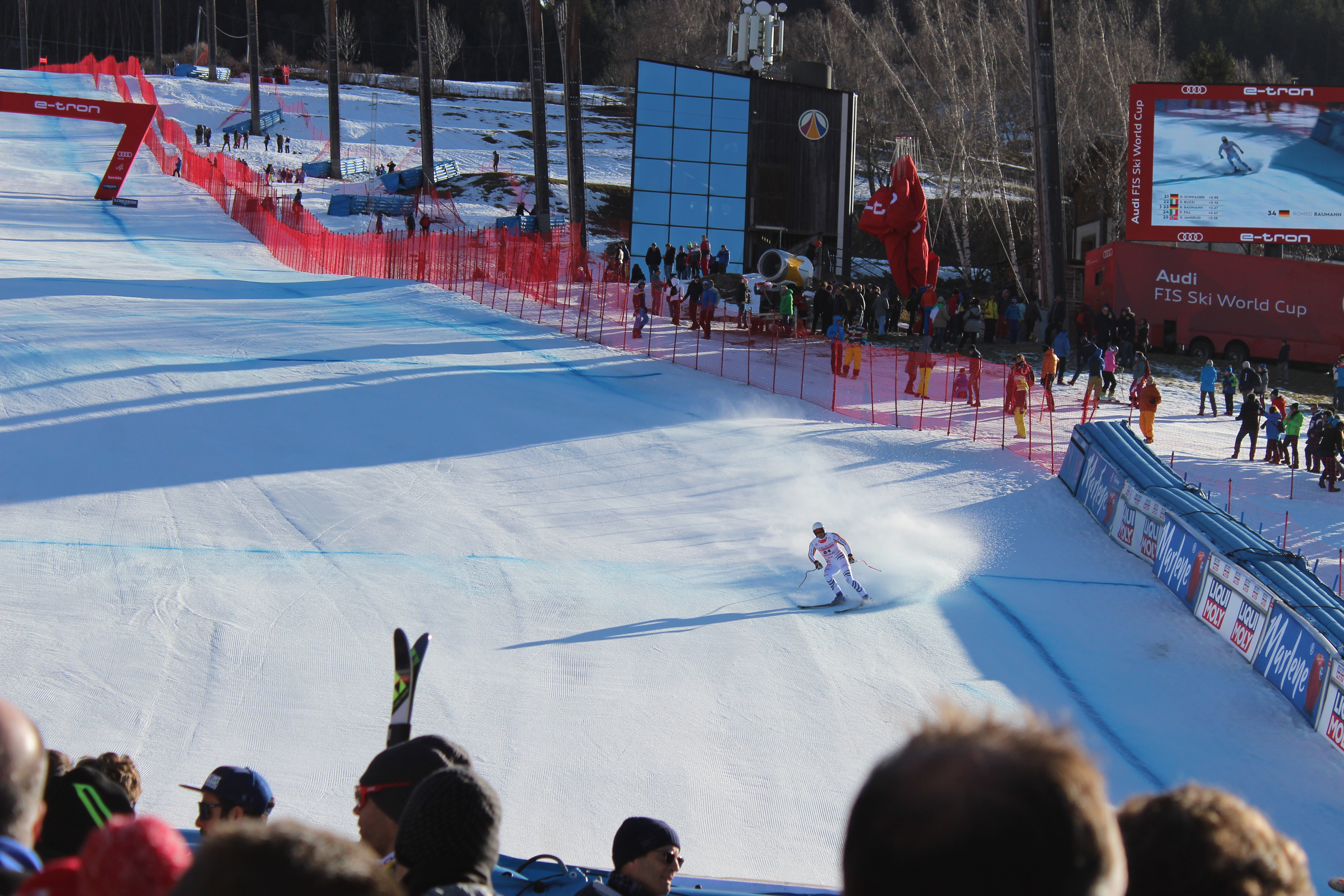 Romed Baumann al traguardo della Pista Stelvio di Bormio, durante la discesa libera del 28 dicembre 2019, valida per la Coppa del Mondo di sci 2019-2020.